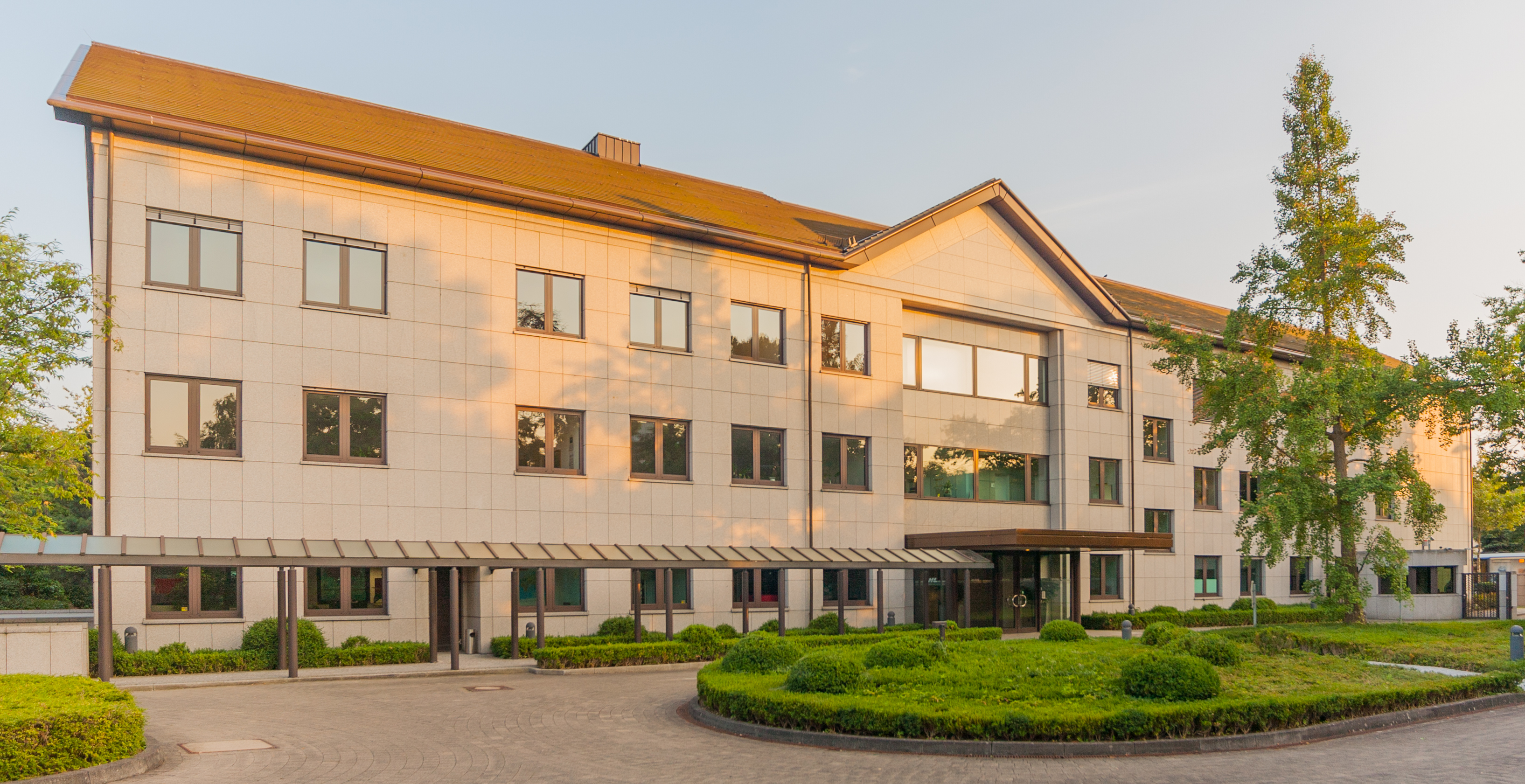 Ehemalige Botschaft von Japan, Godesberger Allee 102–104, Bonn: Ansicht aus Nordost